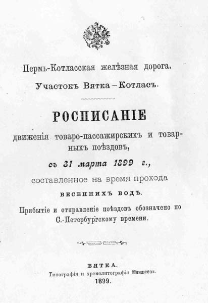 Расписание движения поездов Вятка-Котлас 1899 год